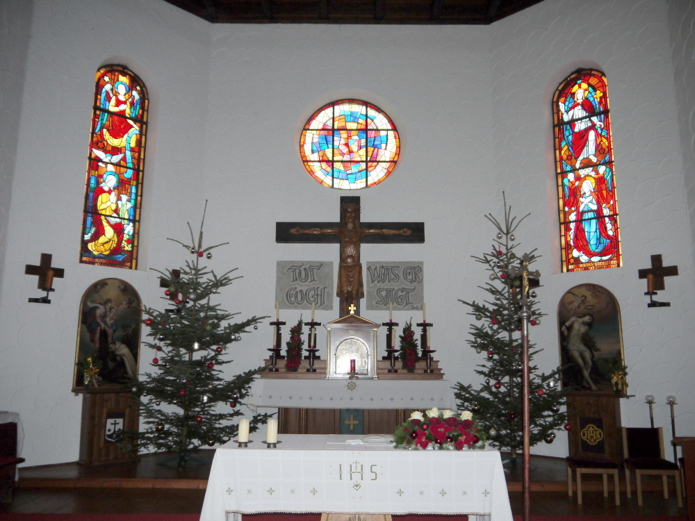 Kath. Pfarrkirche Maria Lourdes und Kriegerdenkmal